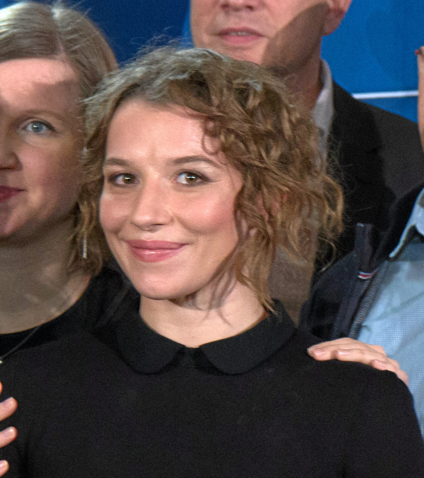 Die Schauspielerin Antonia Bill beim Fotocall im Rahmen der Preview des Tatorts „Der wüste Gobi“.